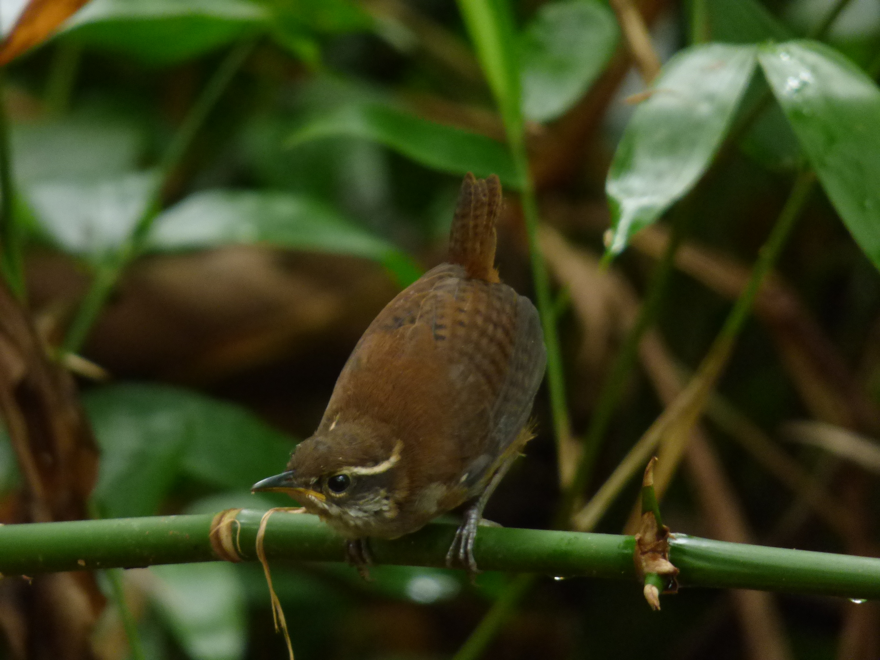 Henicorhina leucosticta (Cucarachero pechiblanco) - Juvenil